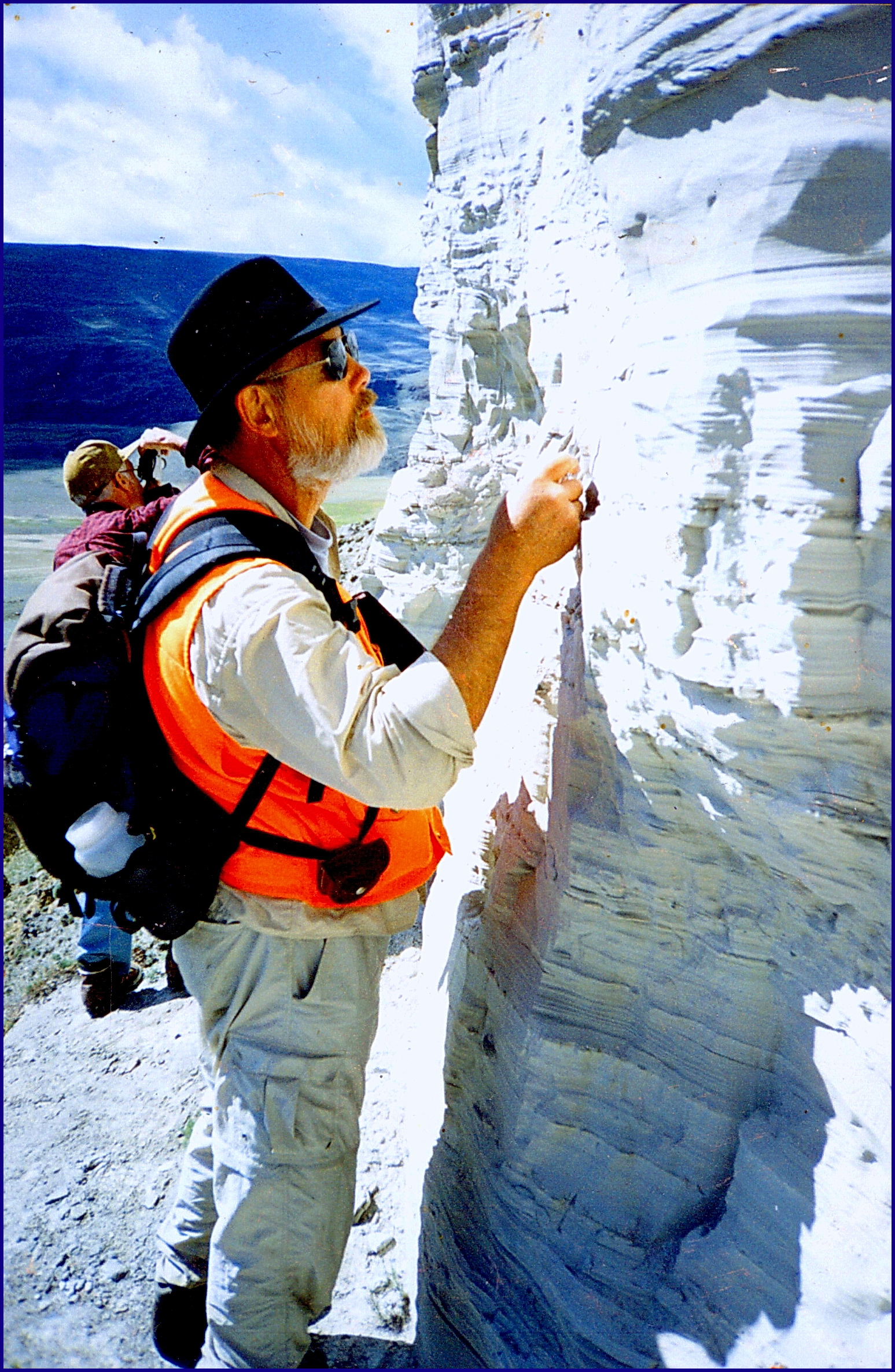 Американский геолог Кинан Ли (Keenan Lee) изучает озерно-ледниковые отложения разреза Чаган, Чаганский скэбленд, Юго-Восточный Алтай. Фото А.Н. Рудого.